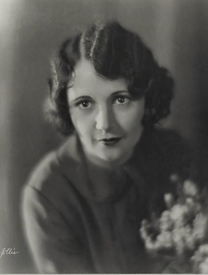 Dorothy Devore